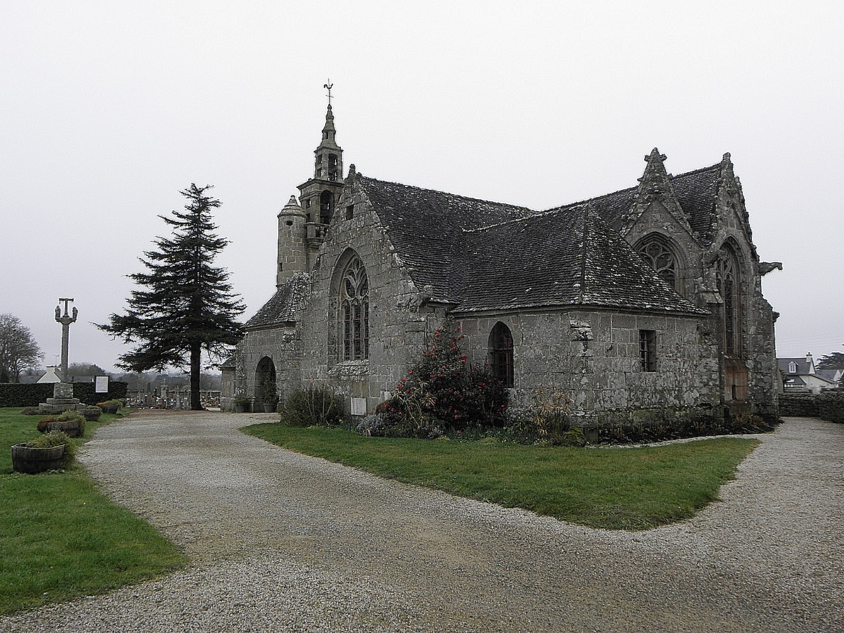 Flanc méridional et chevet de l'église Saint-Dogmaël de Ploulec'h (22).